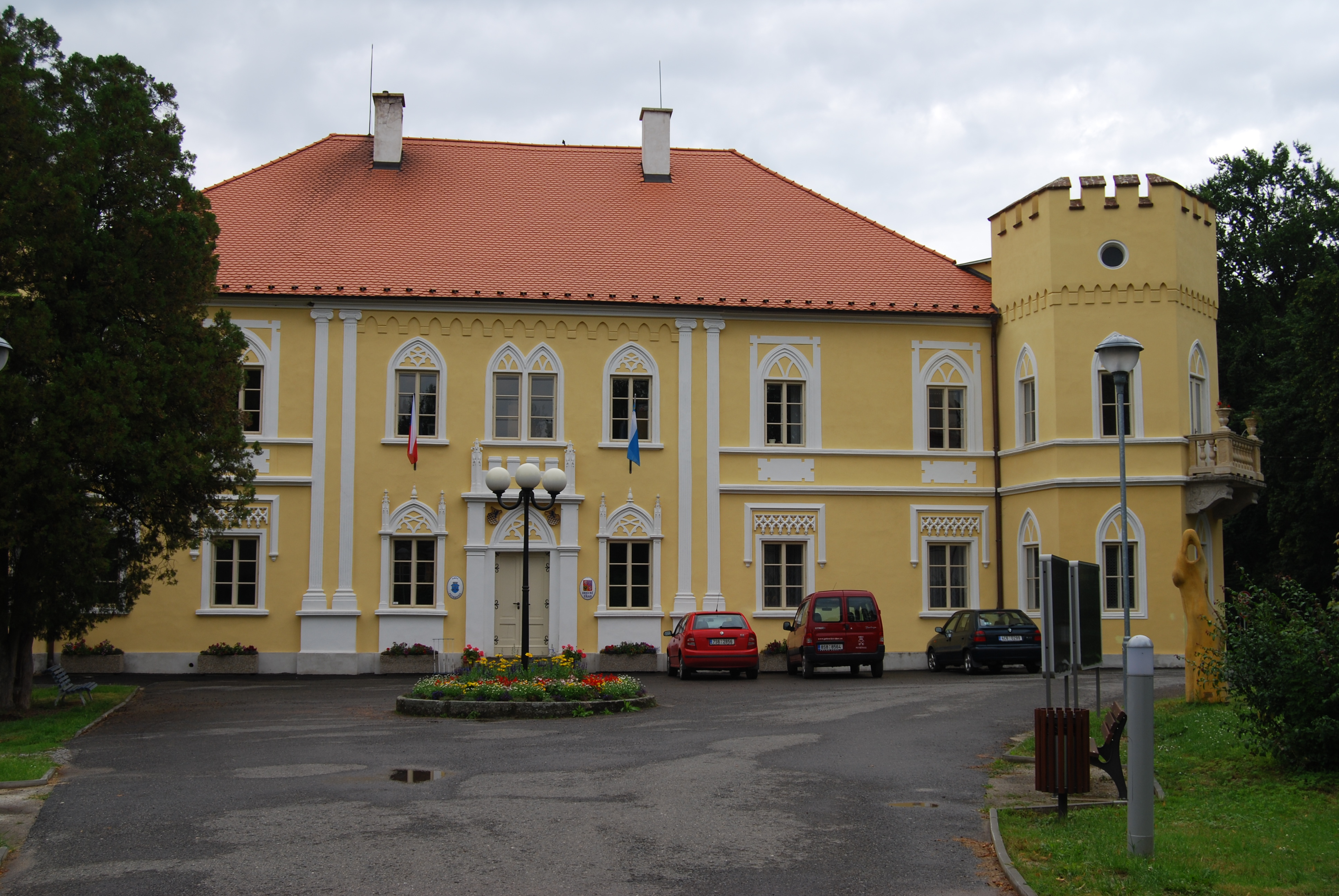 Nová jezuitská kolej, zámek. Petrovice (okres Příbram). Česká republika.